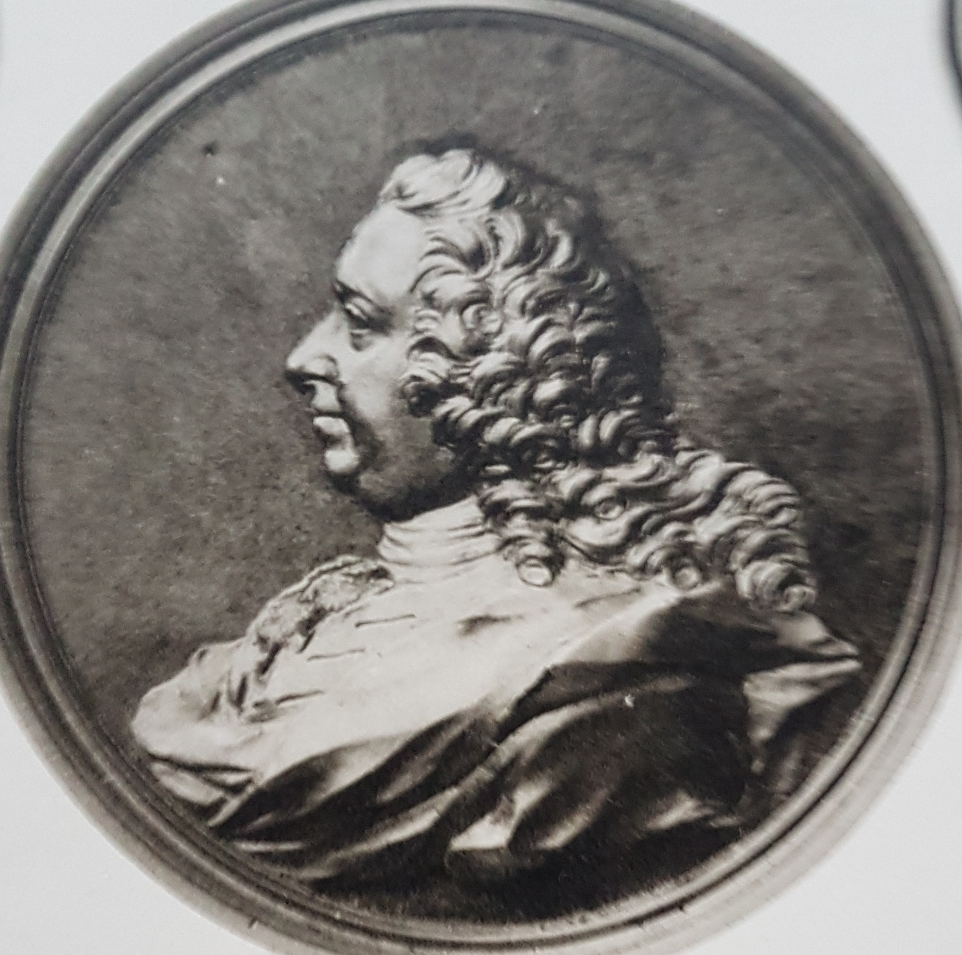 Medalj över Claes Grill skapad av Daniel Fehrman, avfotograferad bild från Allhems Svenskt konstnärslexikon.